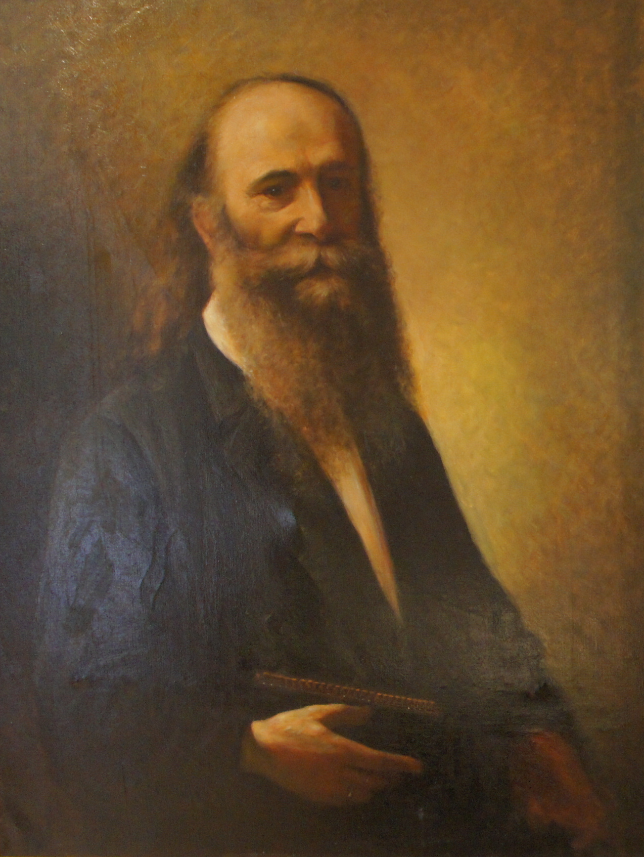 Arthur Lutze. Kopie nach einem Gemälde in der Lutze-Klinik in Köthen. Öl auf Leinwand